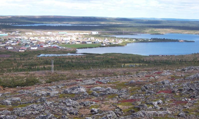 Ville de Schefferville